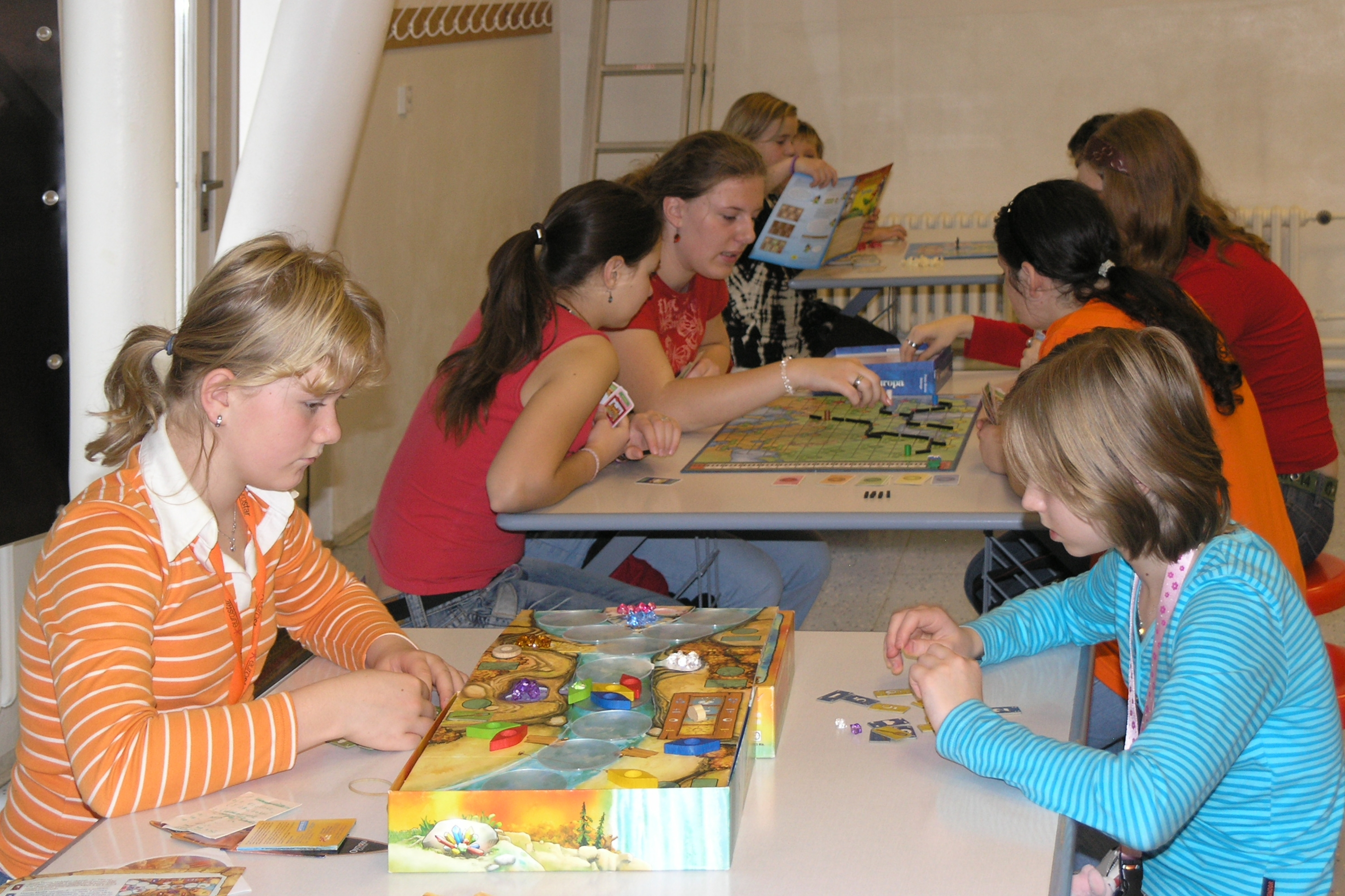 Goliáš a David 2008